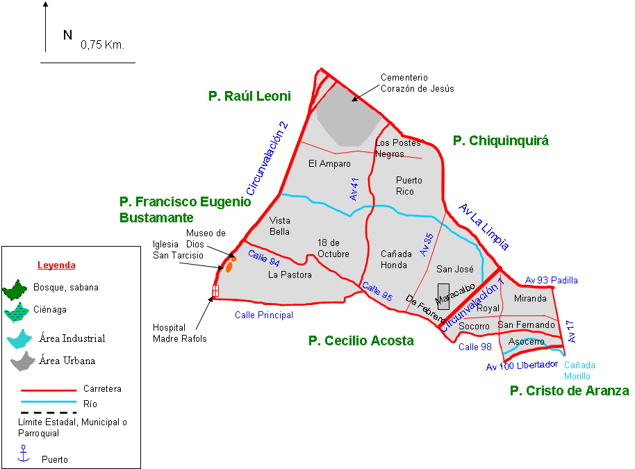 Mapa de la parroquia Cacique Mara del municipio Maracaibo. Estado Zulia. Venezuela